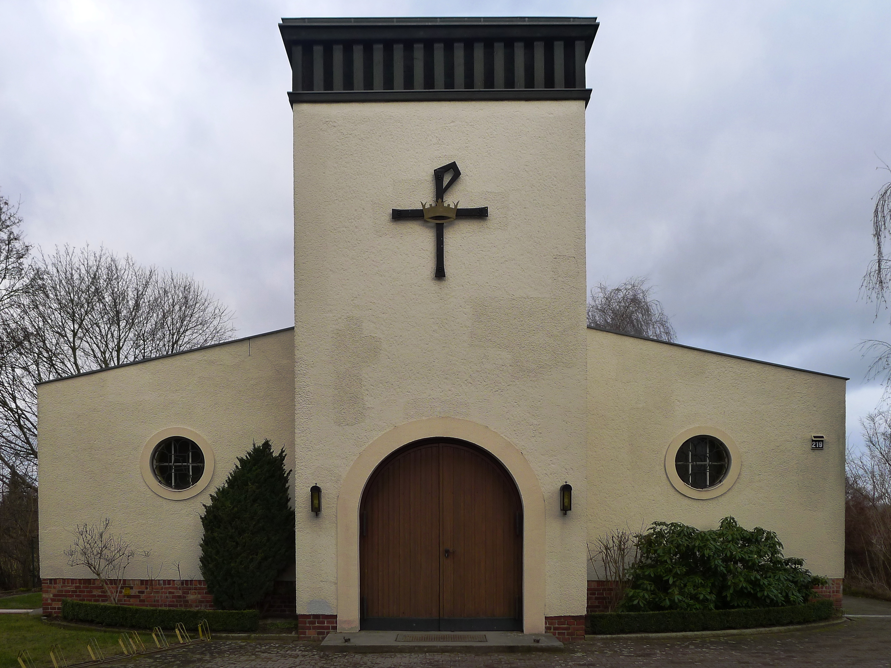 Portalturm der Kirche